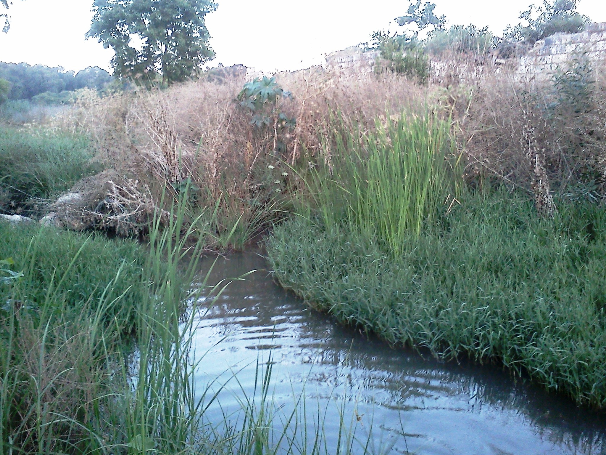 תעלת עינת ביציאה מהאגם בפארק אנטיפטריס